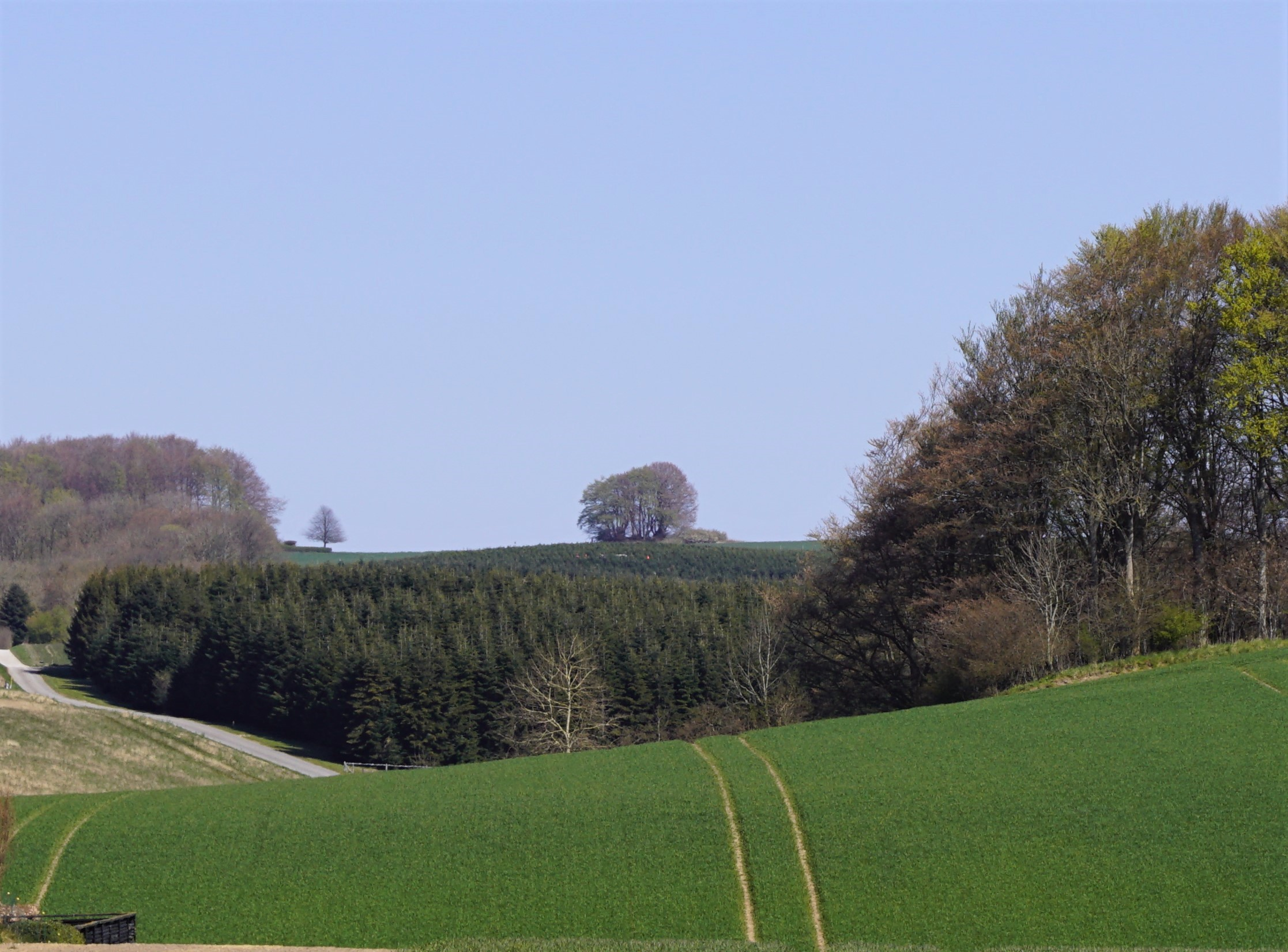 Purhøj set mod nord fra Bjerre